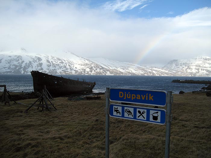 Djúpavík in Iceland